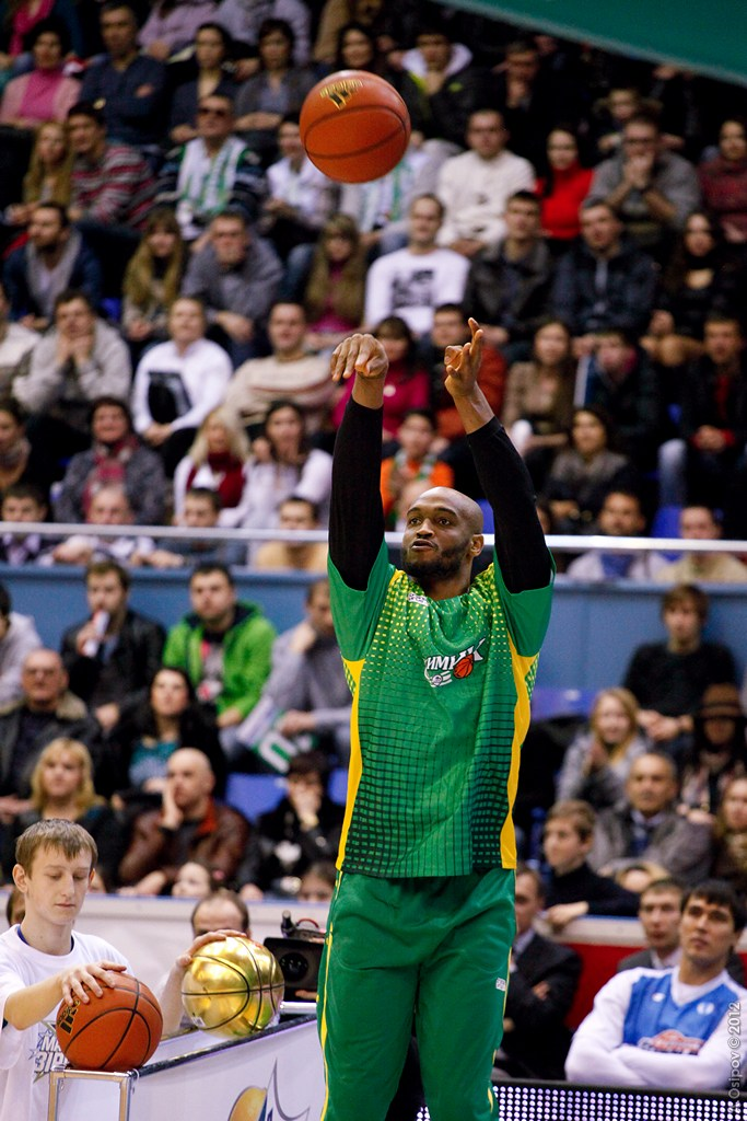 Матч всех звезд баскетбольной Суперлиги 2012. Киев. Ukrainian All-star